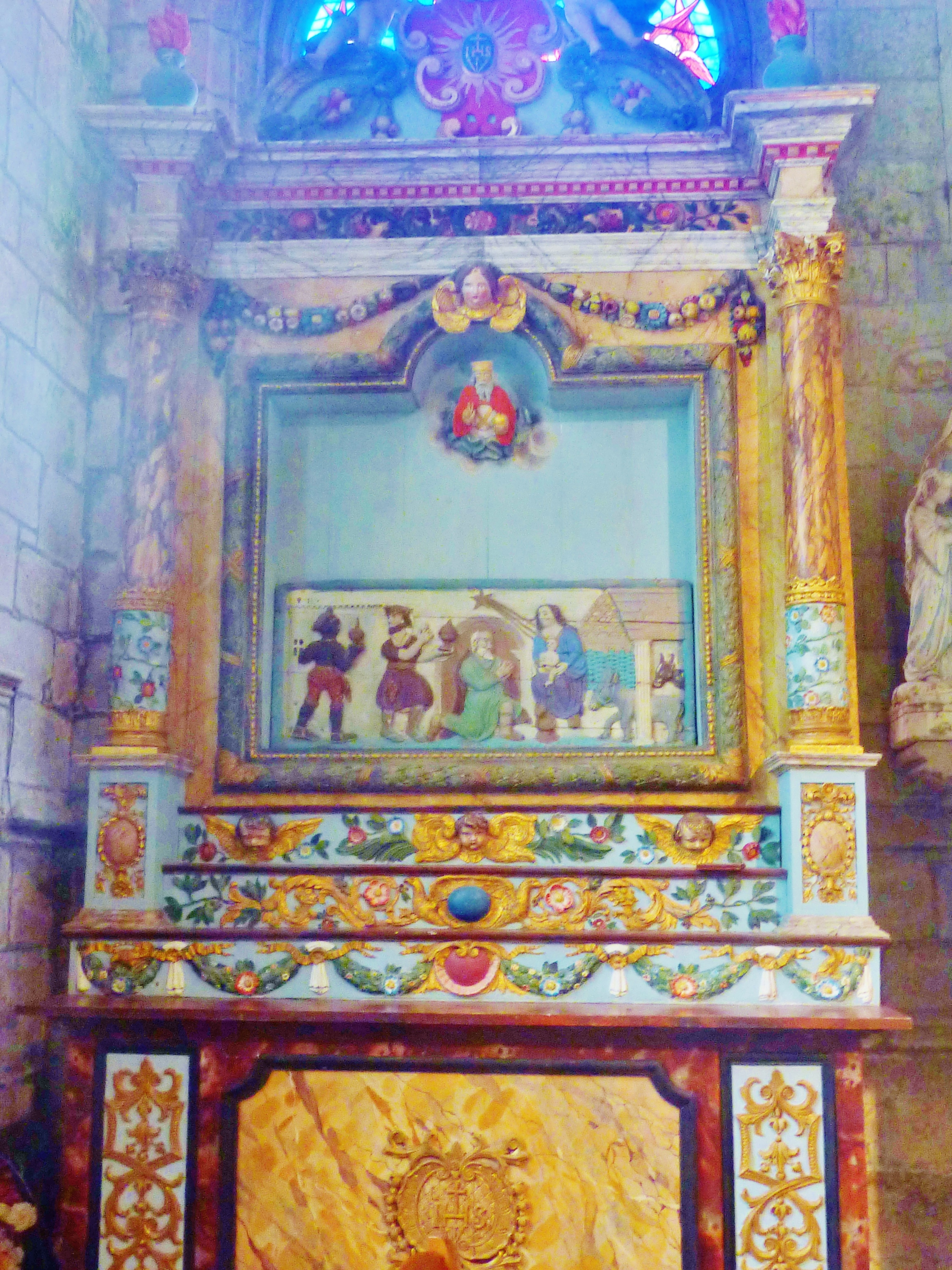 Ergué-Gabéric : chapelle Notre-Dame-de-Kerdévot, autel latéral